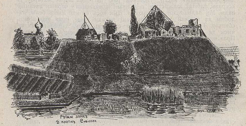 Беларуская (тарашкевіца): Сьвіслач (Śvisłač). Замак